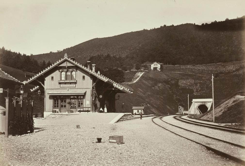 Bötzbergbahn: Station Bötzenegg (heutiger Name: Schinznach-Dorf) und Südportal des Bözbergtunnels